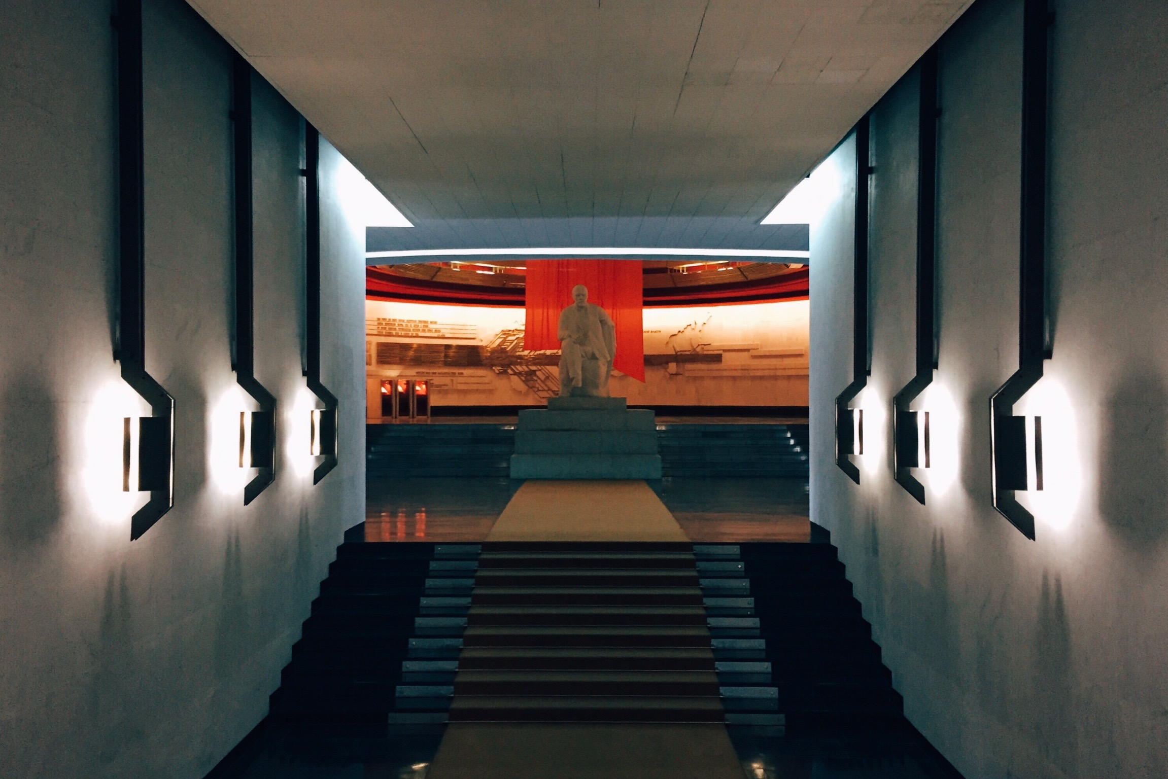 Ленинские Горки Moscow in 2015; Москва в 2015